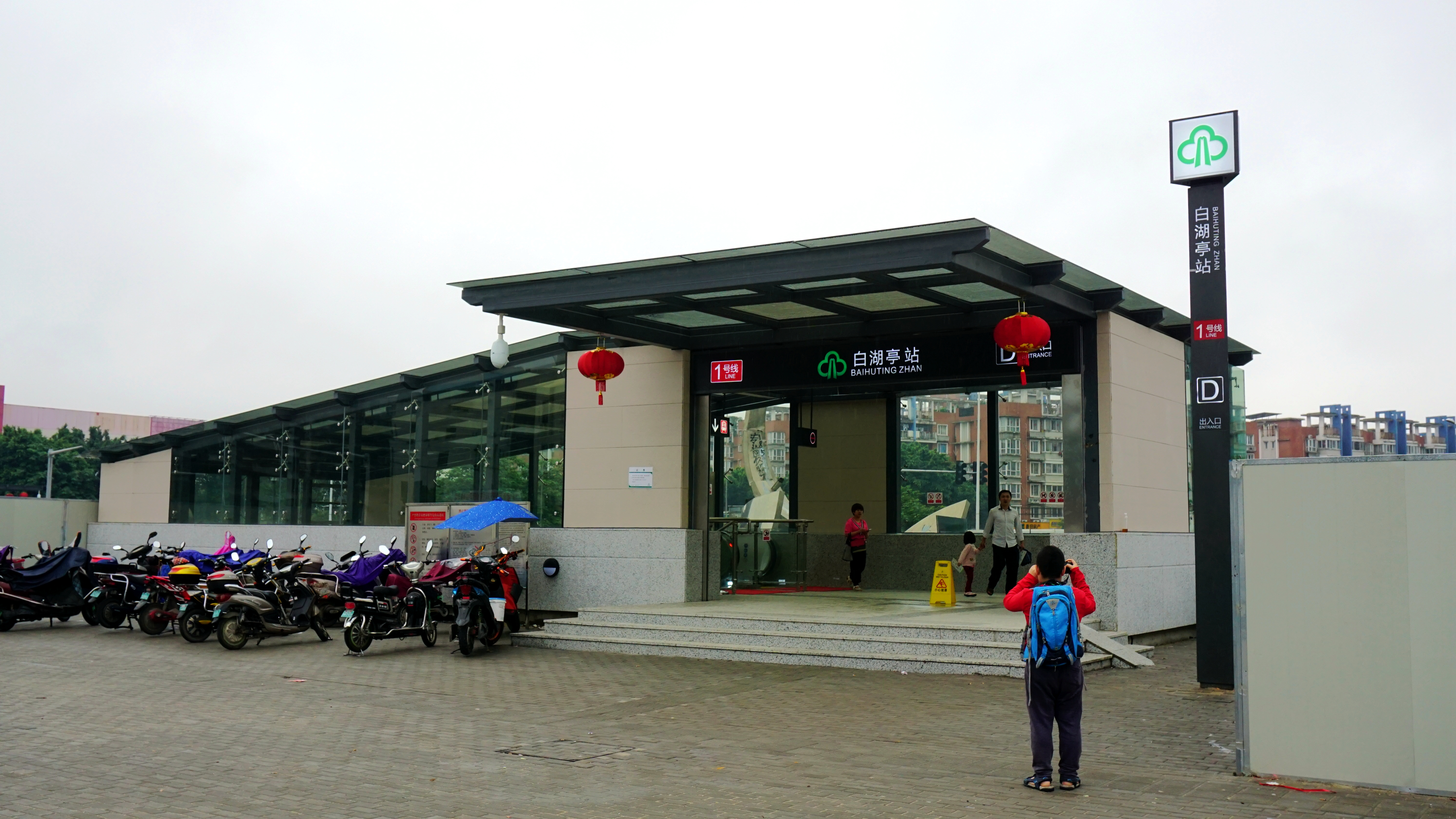 福州地铁1号线，白湖亭站D出口